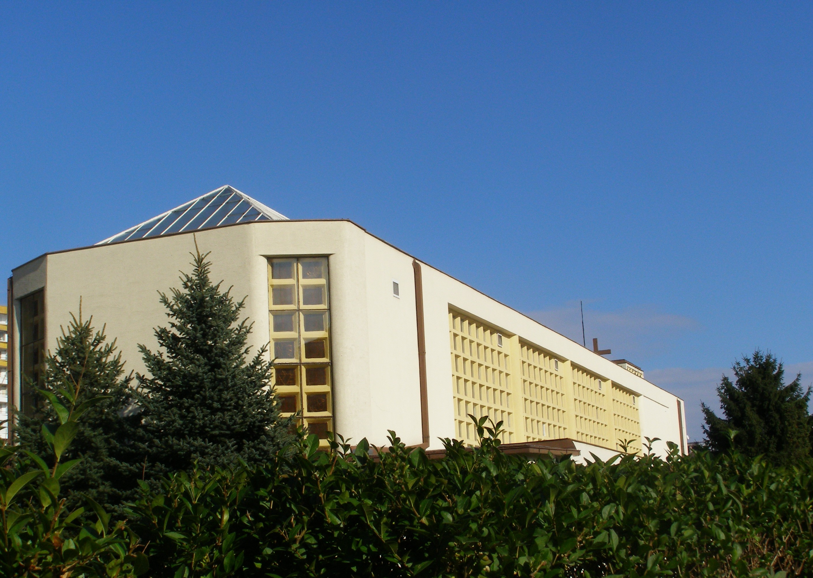 Petržalka church